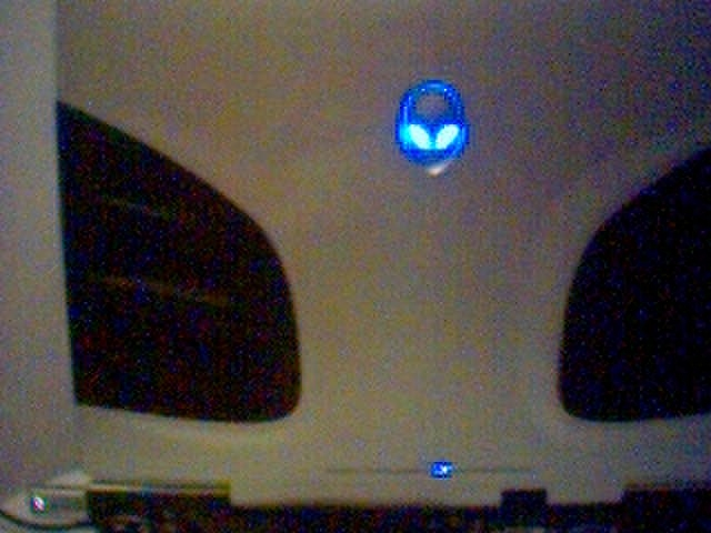 stražnji dio Aurora m9700 prijenosnog računala